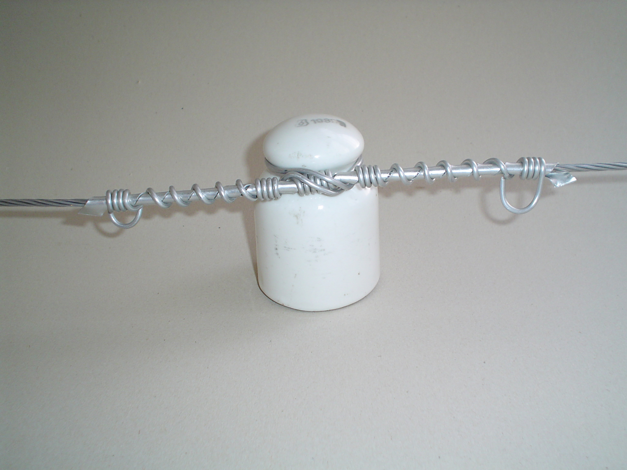 Aluminia_aerkonduktilo sur porcelana izolaĵo.